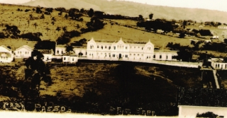 Edifício da Santa Casa da Misericórdia de Passos, 1905